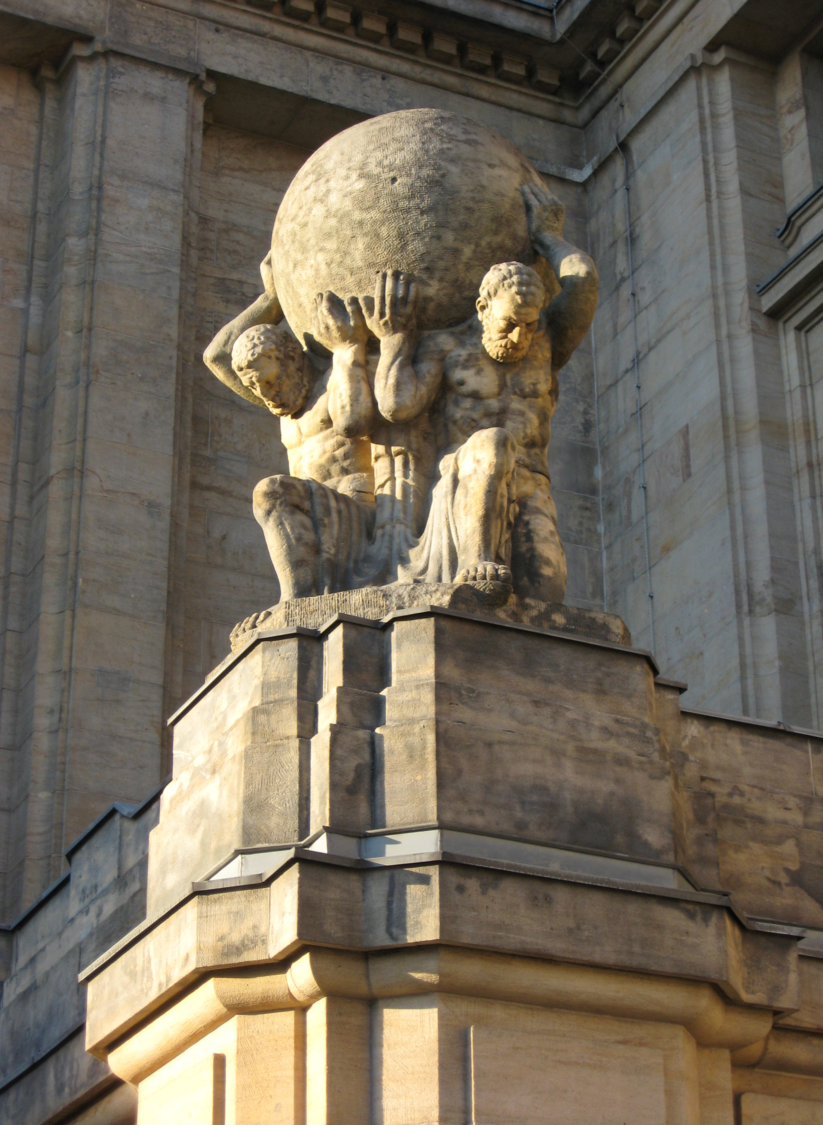 Atlas-Figur des Bildhauers Arthur Lange am Leipziger Hauptbahnhof, Westhalle